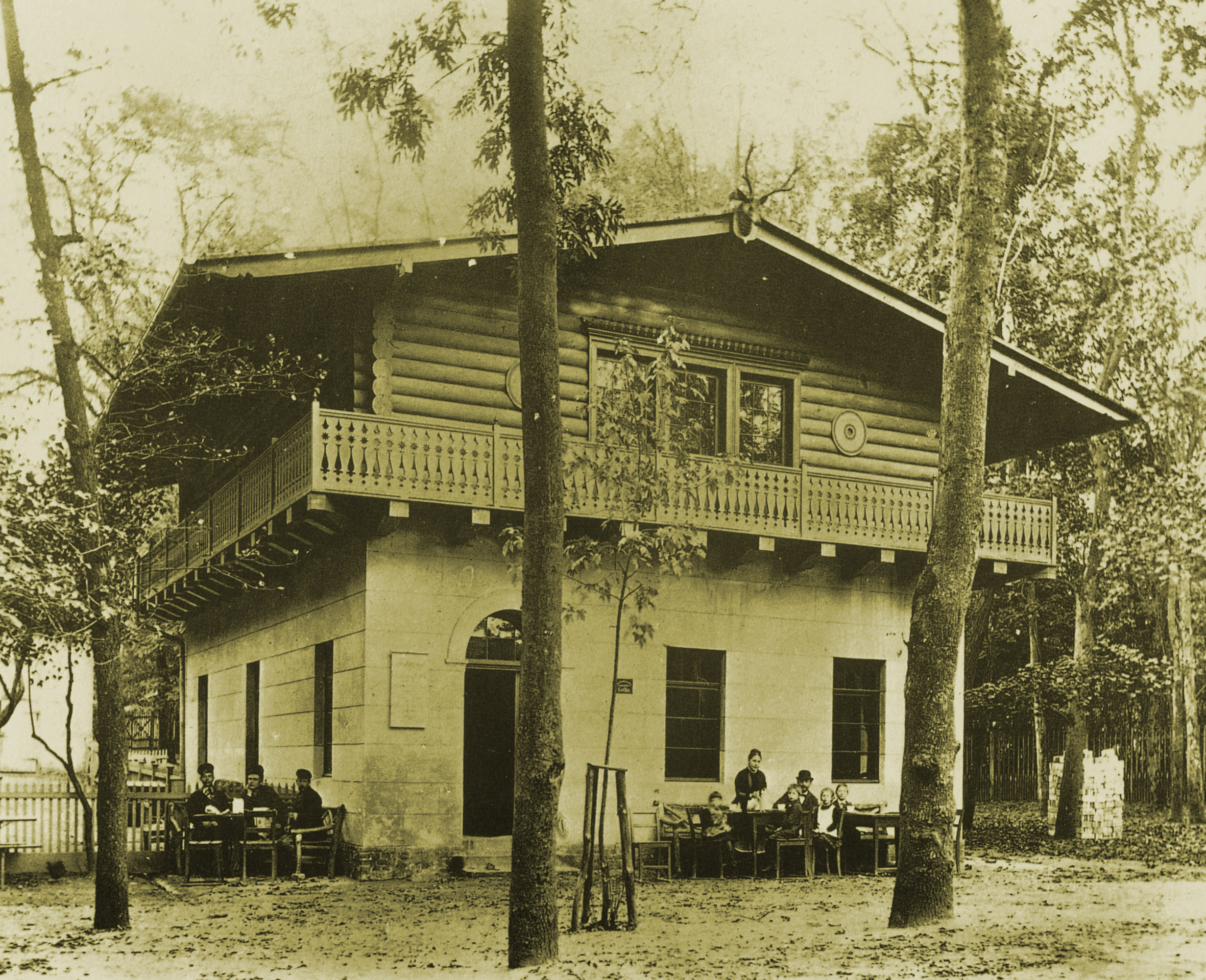 Wirtshaus Moorlake in Berlin-Wannsee, Bildpostkarte 1910 (Ausschnitt)